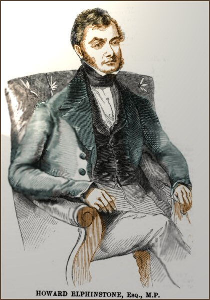 Elphinstone in 1843